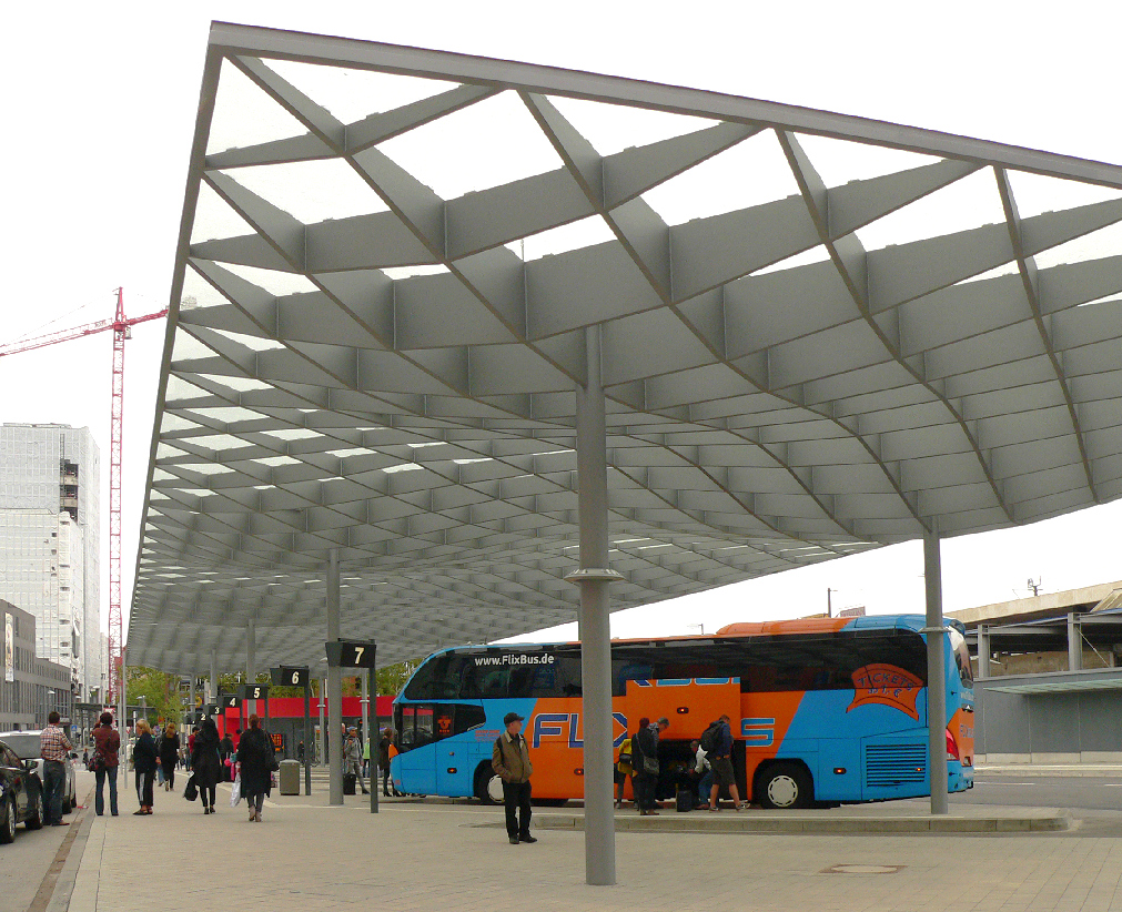 Zentraler Omnibusbahnhof Hannover